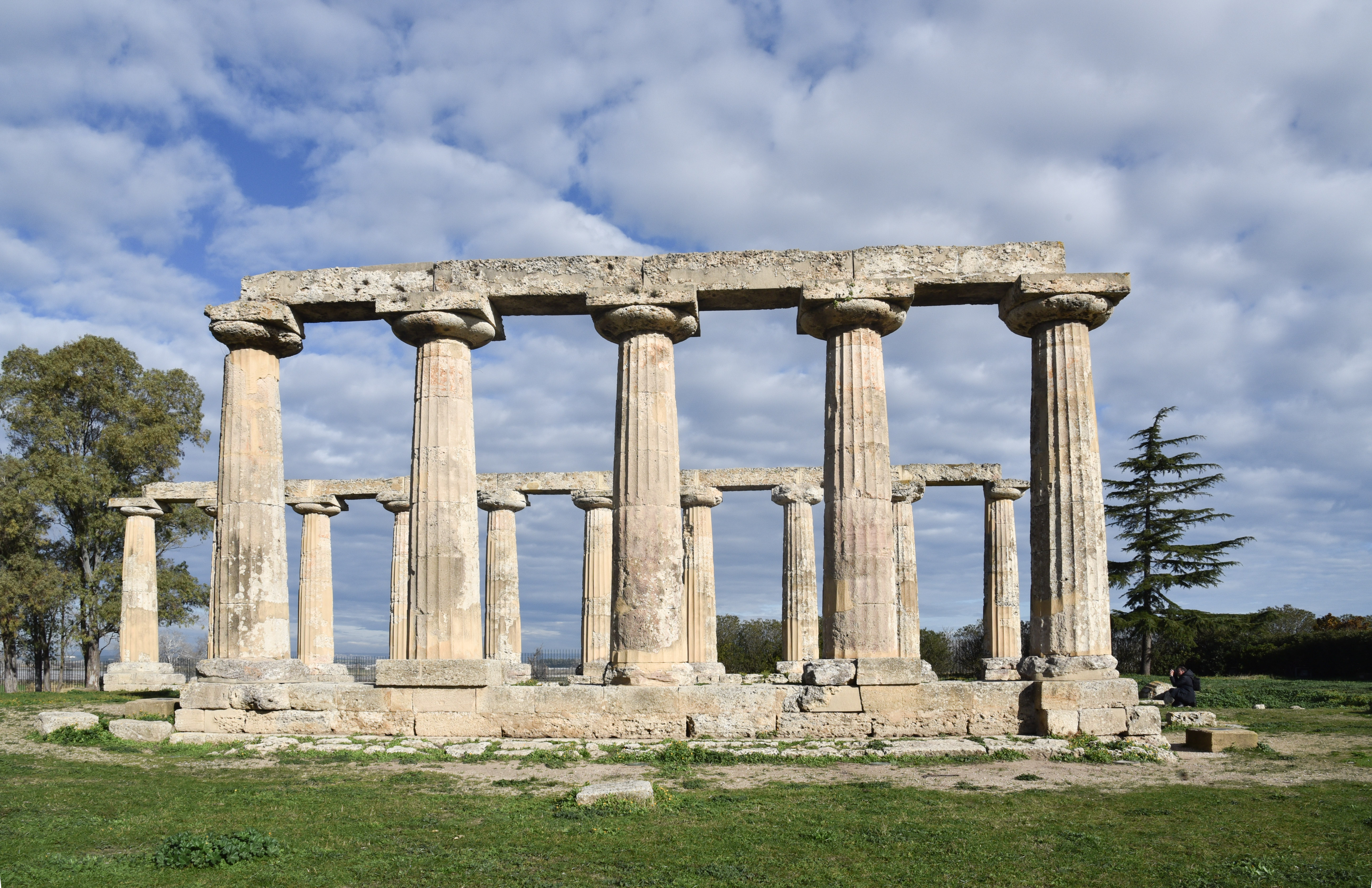 Metaponto This is a photo of a monument which is part of cultural heritage of Italy.